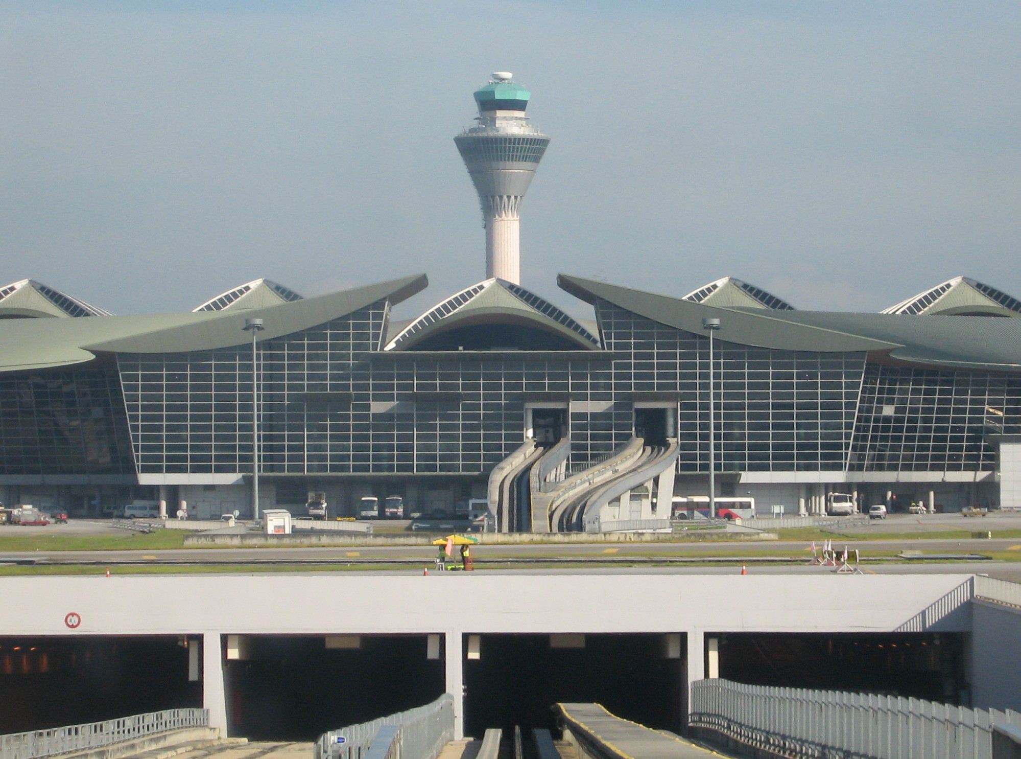 KLIA PTC + Tower